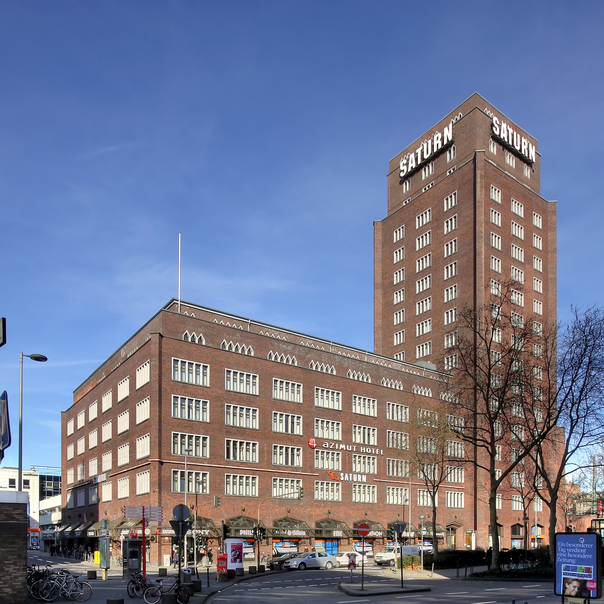 Gesamtansicht des Hanshochhauses mit zugehörigem 6-stöckigem Büro- und Geschäftshaus von Südwest. Architekt: Jacob Koerfer, Baujahr: 1924-1925.